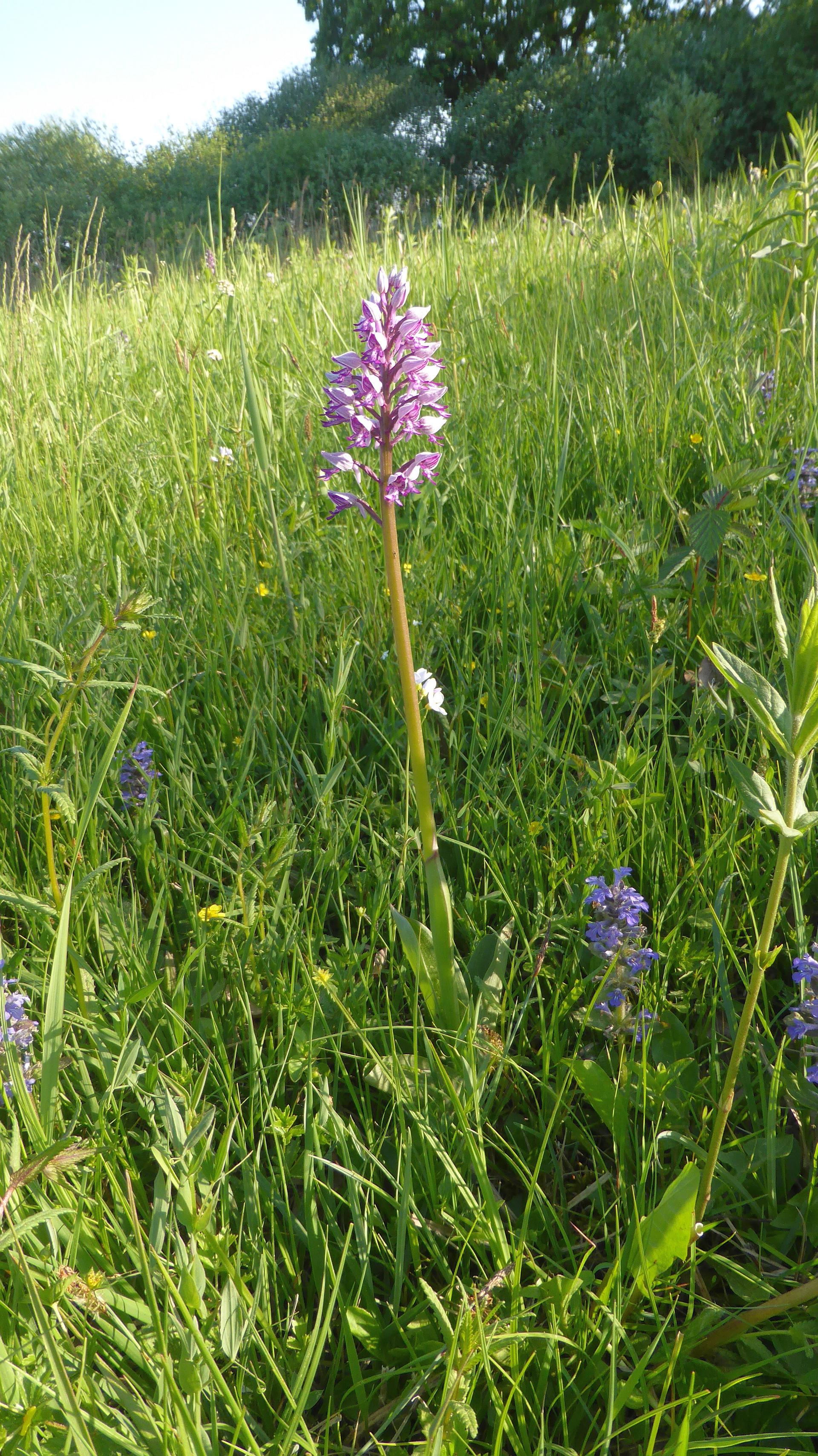 Helm-Knabenkraut (Orchis militaris), Sauscholle, 6.05.2018